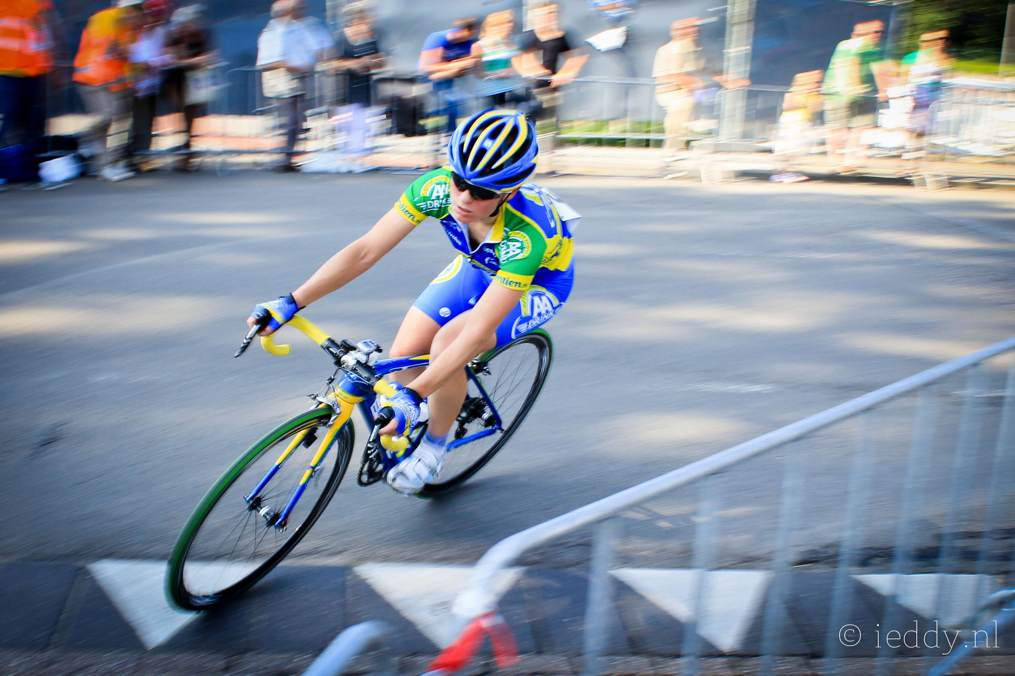 Daphny van den Brand Draai van de Kaai 2011